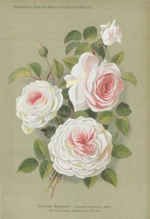 Rose 'Clotilde Soupert' (Soupert & Notting, 1888) in Rosen-Zeitung, août 1889.